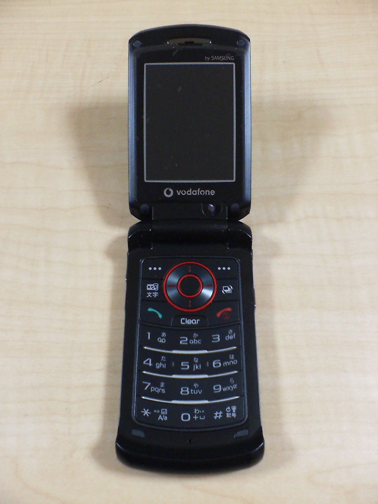 Vodafone 804SS (Samsung SGH-Z540) mobile phone